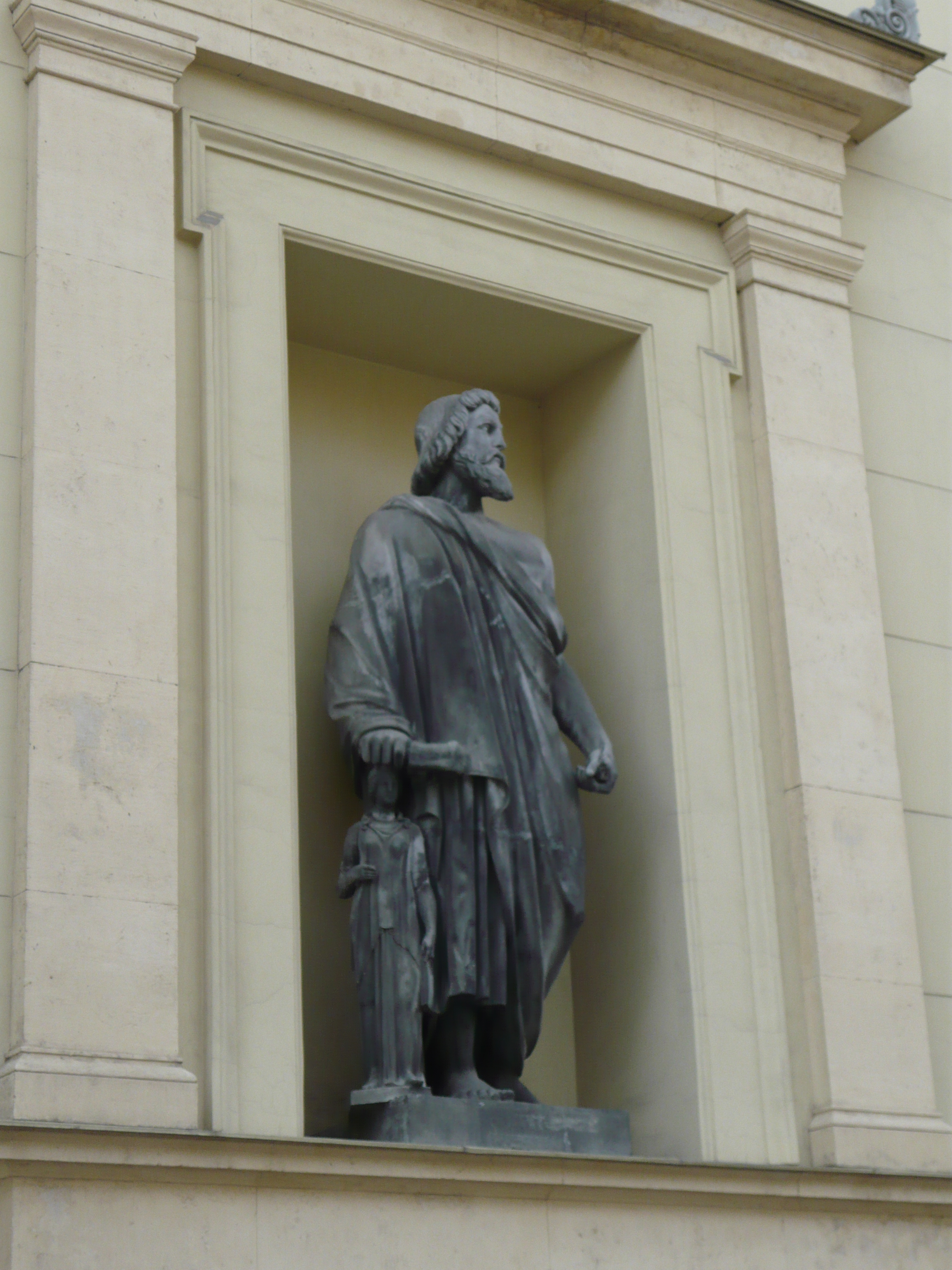 Статуя Смилида (Σμίλις) — древнегреческого ваятеля и зодчего, родом из Эгины, жившего в VI в. до Р. Хр. и трудившегося на о-ве Самос.